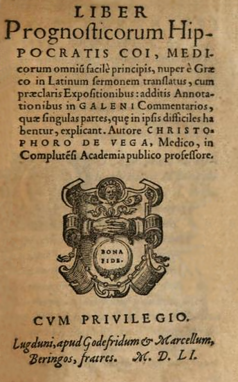 Portada del libro Liber prognosticorum Hippocratis. Publicado por Cristóbal de Vega en Lyon, en 1551.